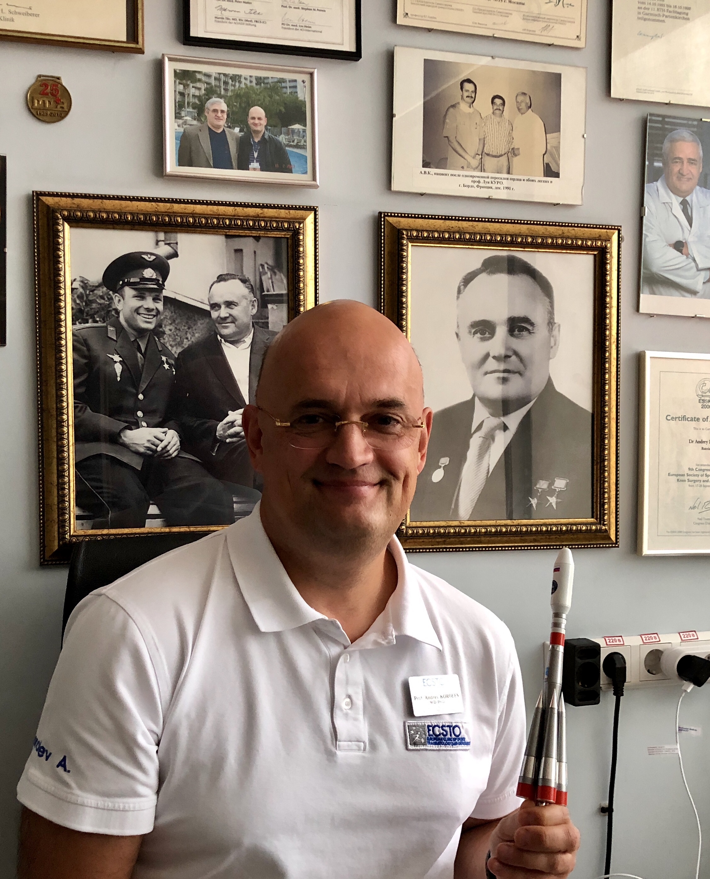 Фотография Андрея Вадимовича Королева